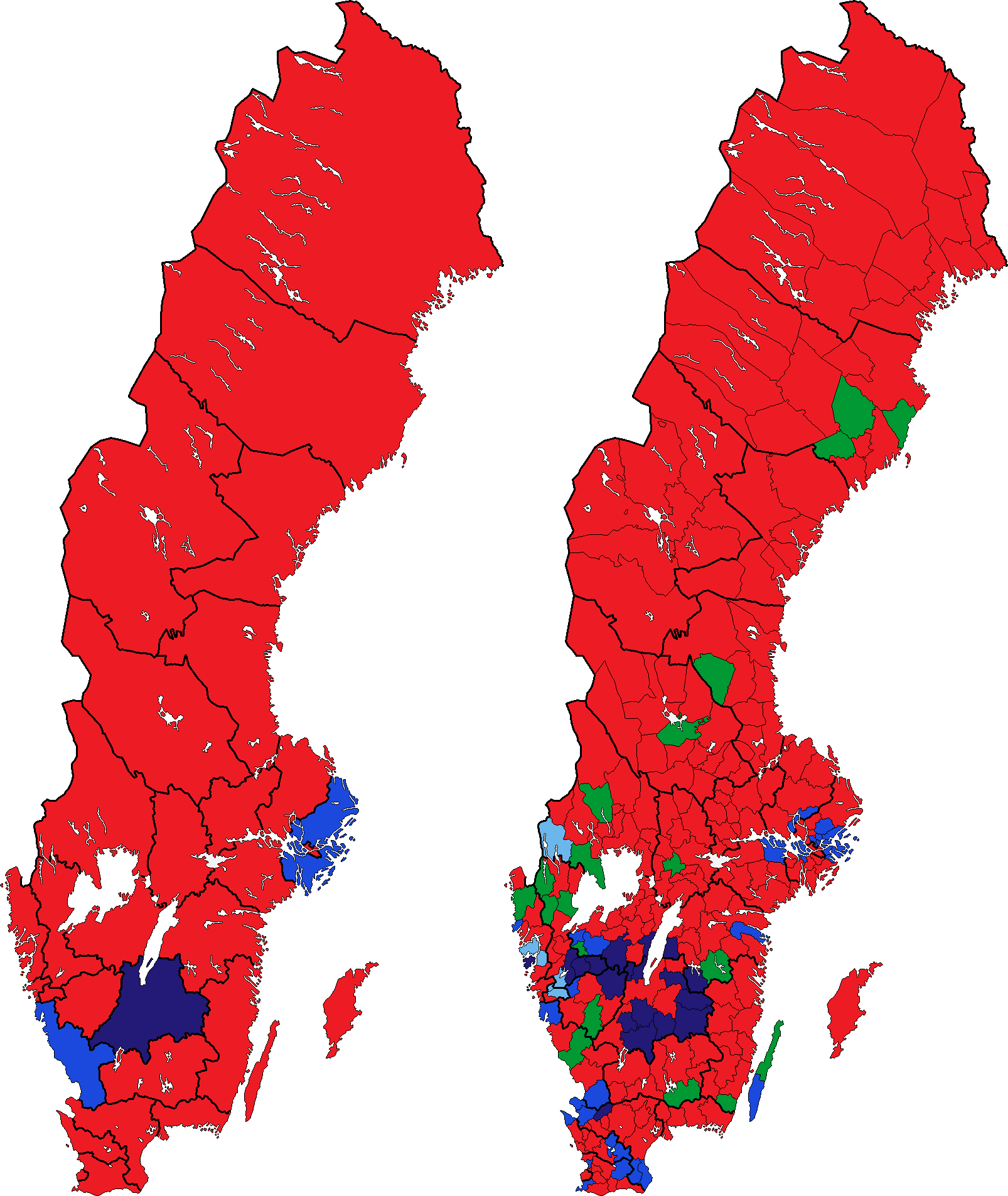 Största parti inom det ledande blocket i samtliga valkretsar och kommuner i riksdagsvalet 2002. Moderata samlingspartiet, Folkpartiet liberalerna, Centerpartiet och Kristdemokraterna har räknats till det borgerliga blocket medan Arbetarpartiet-Socialdemokraterna, Vänsterpartiet och Miljöpartiet har räknats till det socialistiska blocket. Partier därutöver räknas som egna block. Socialdemokraterna Moderaterna Centerpartiet Folkpartiet Kristdemokraterna